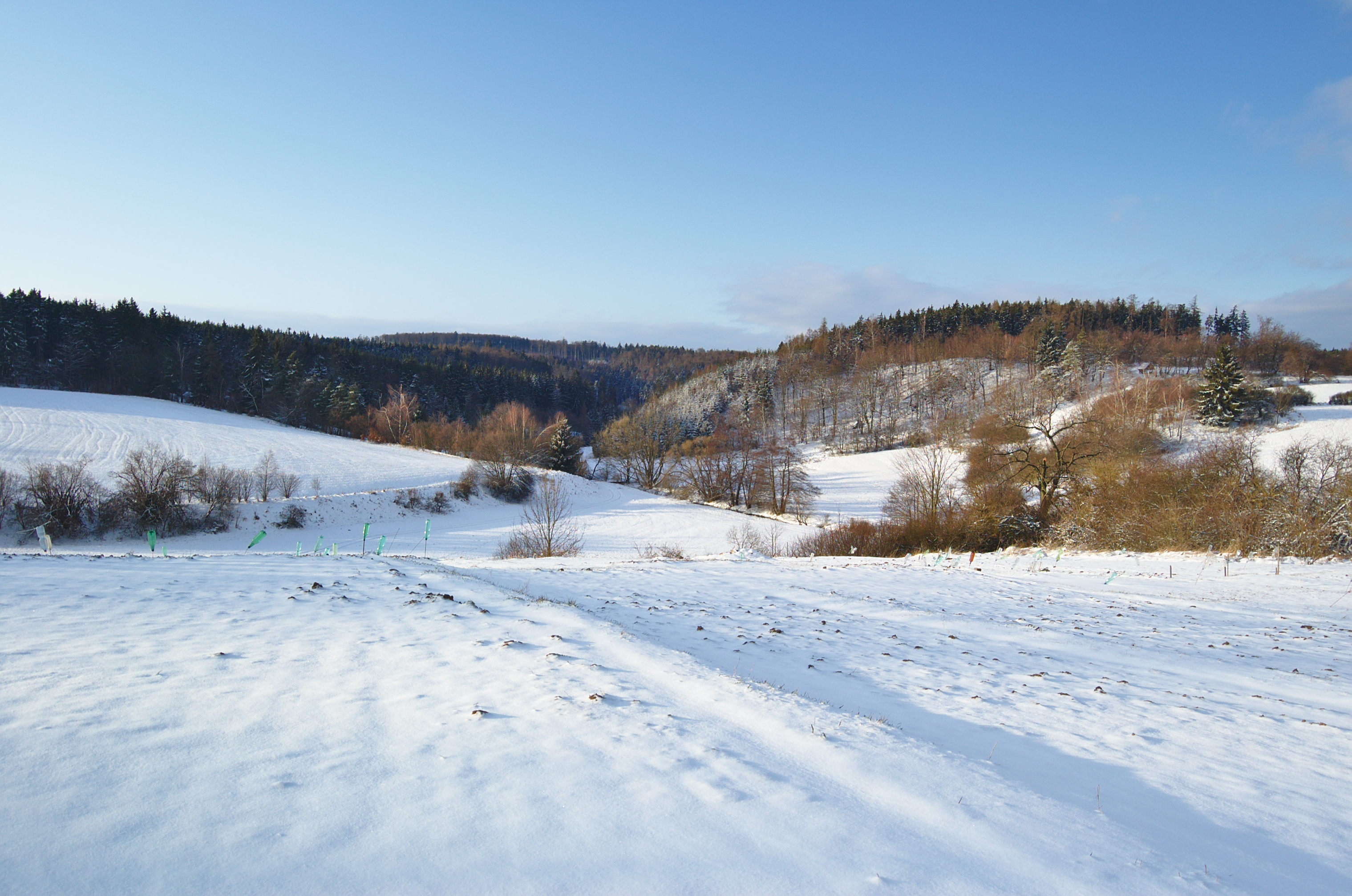 Pohled na údolí řeky Zábrany, Malé Hradisko, okres Prostějov